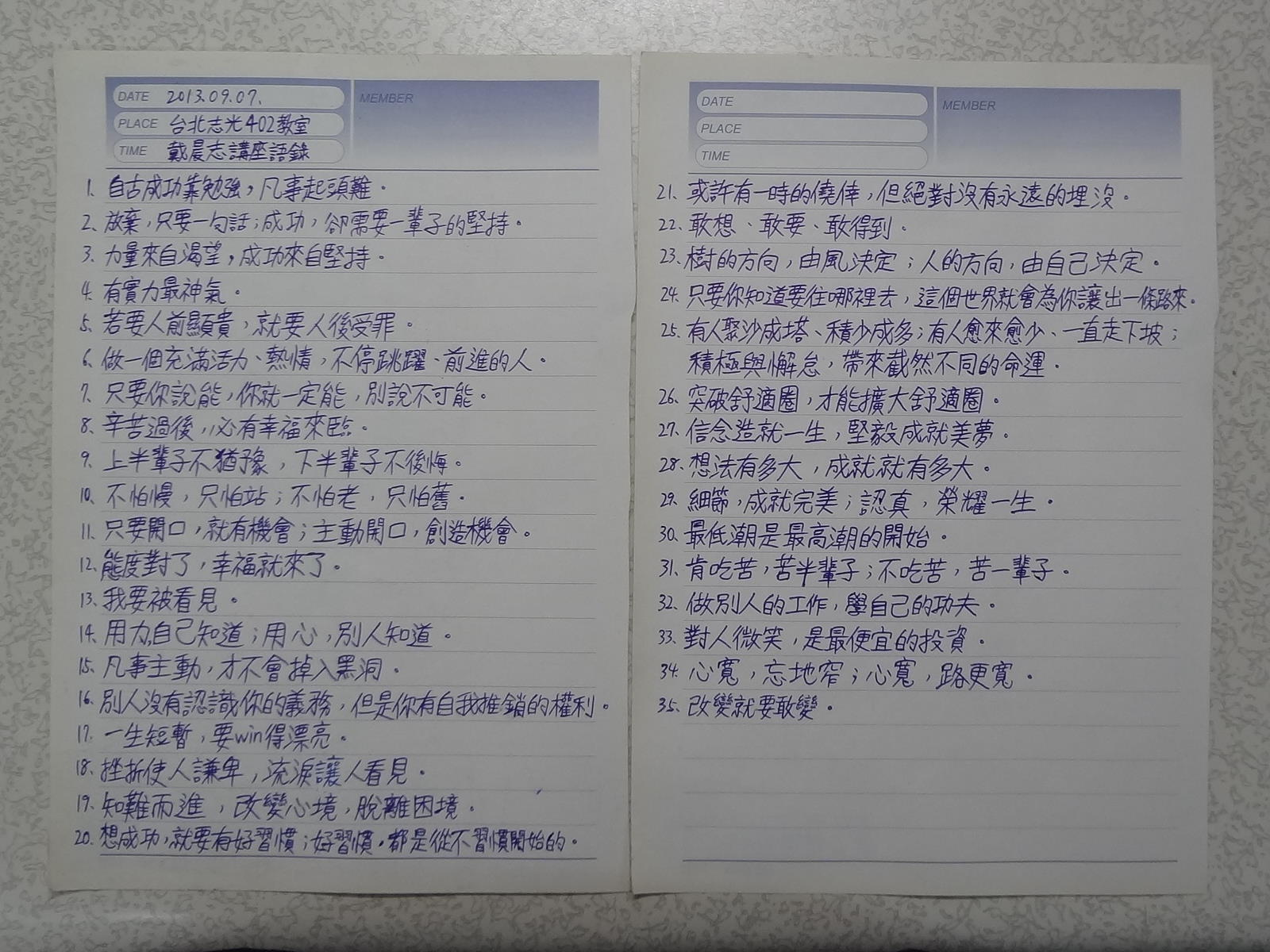 2013年9月7日，戴晨志在臺北市中正區許昌街臺北志光補習班演講，邊講邊請聽眾抄寫的筆記。